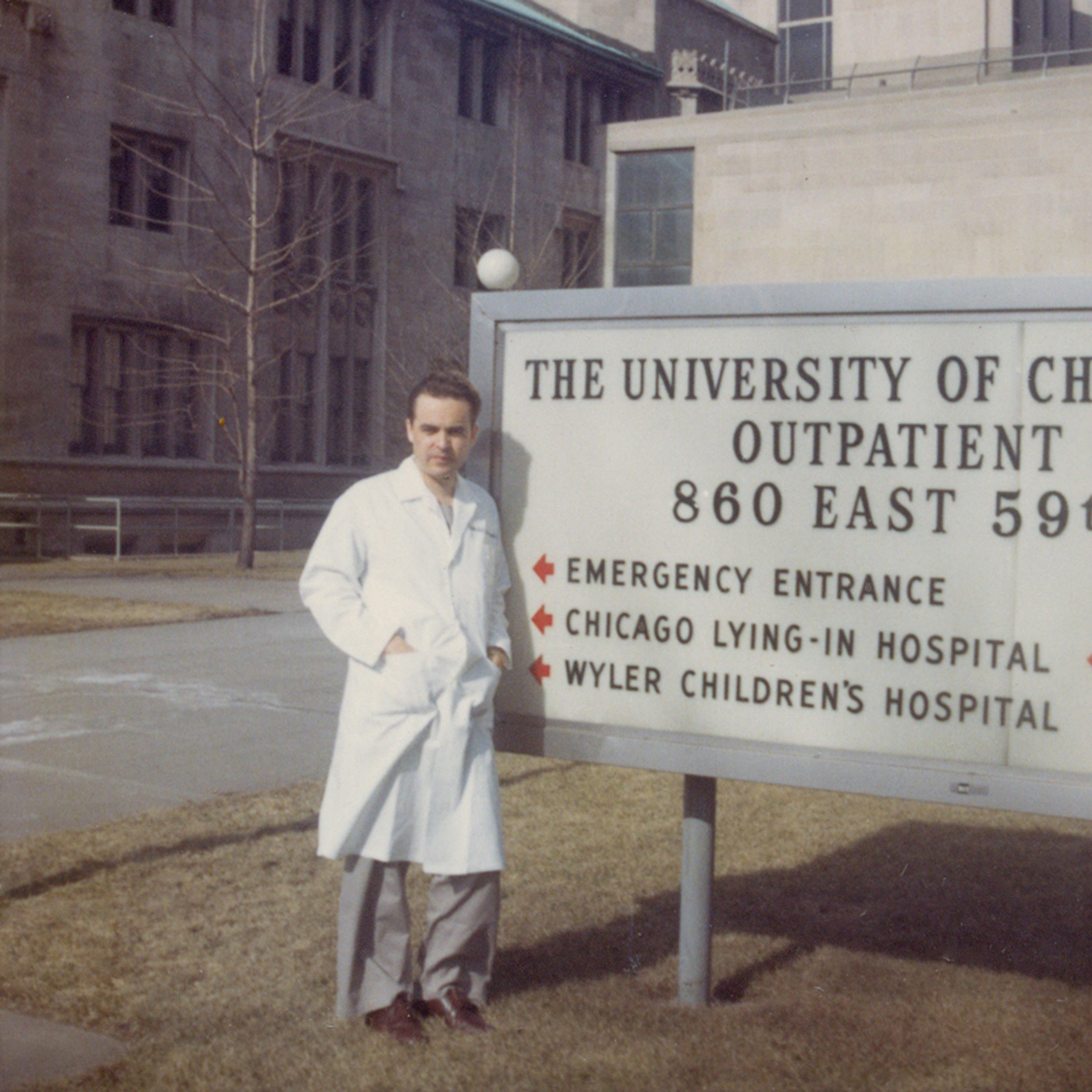 Alfonso del Granado, 1968